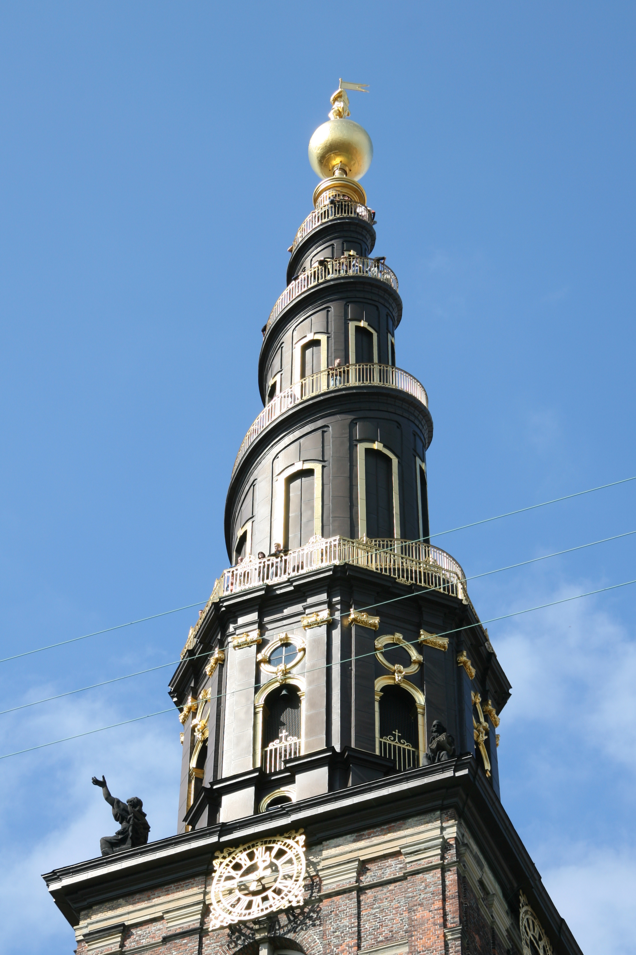 Vor Frelser Kirke (Church of Our Saviour), Copenhagen, Denmark. Steeple.